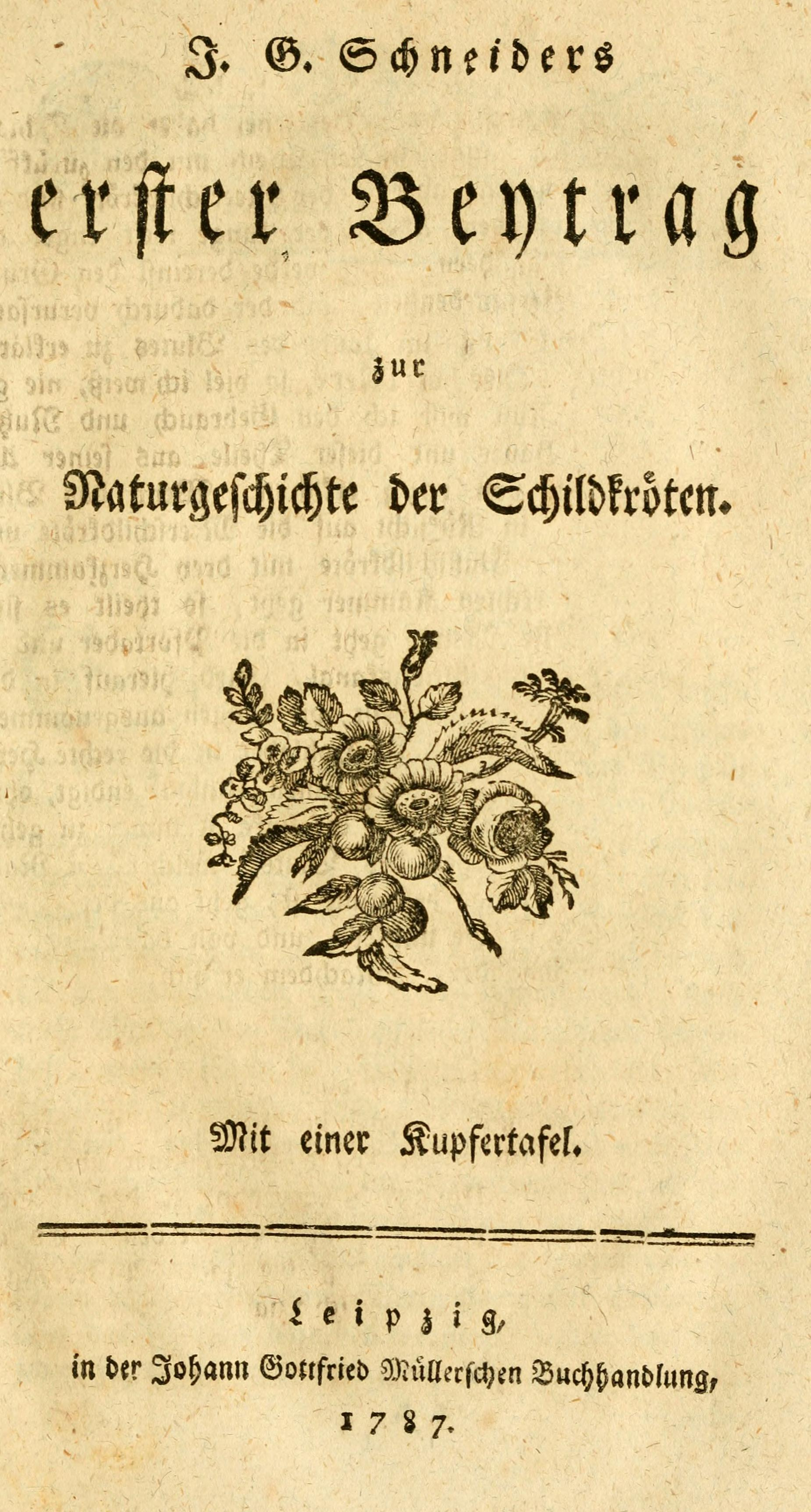 Allgemeine Naturgeschichte der Schildkröten : nebst einem systemischen Verzeichnisse der einzelnen Arten und zwey Kupfern / von Johann Gottlob Schneider.